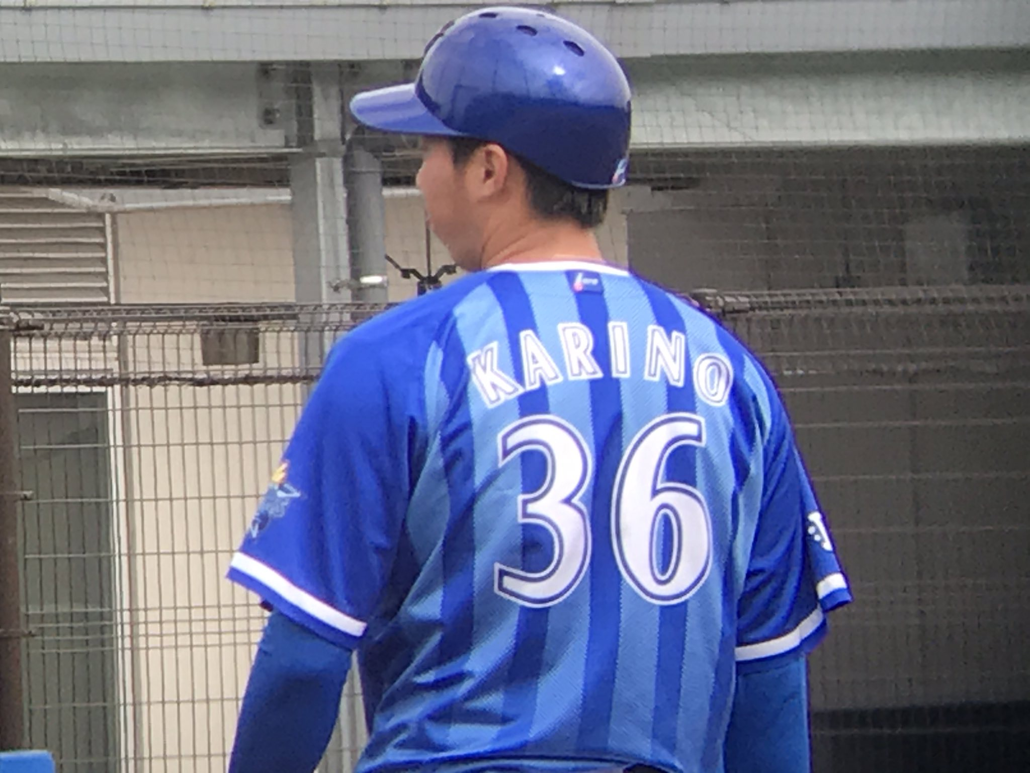 打撃投手時代